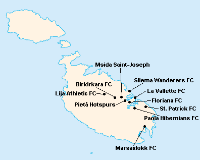 Répartition des clubs de Premier League Maltaise 2004-2005.